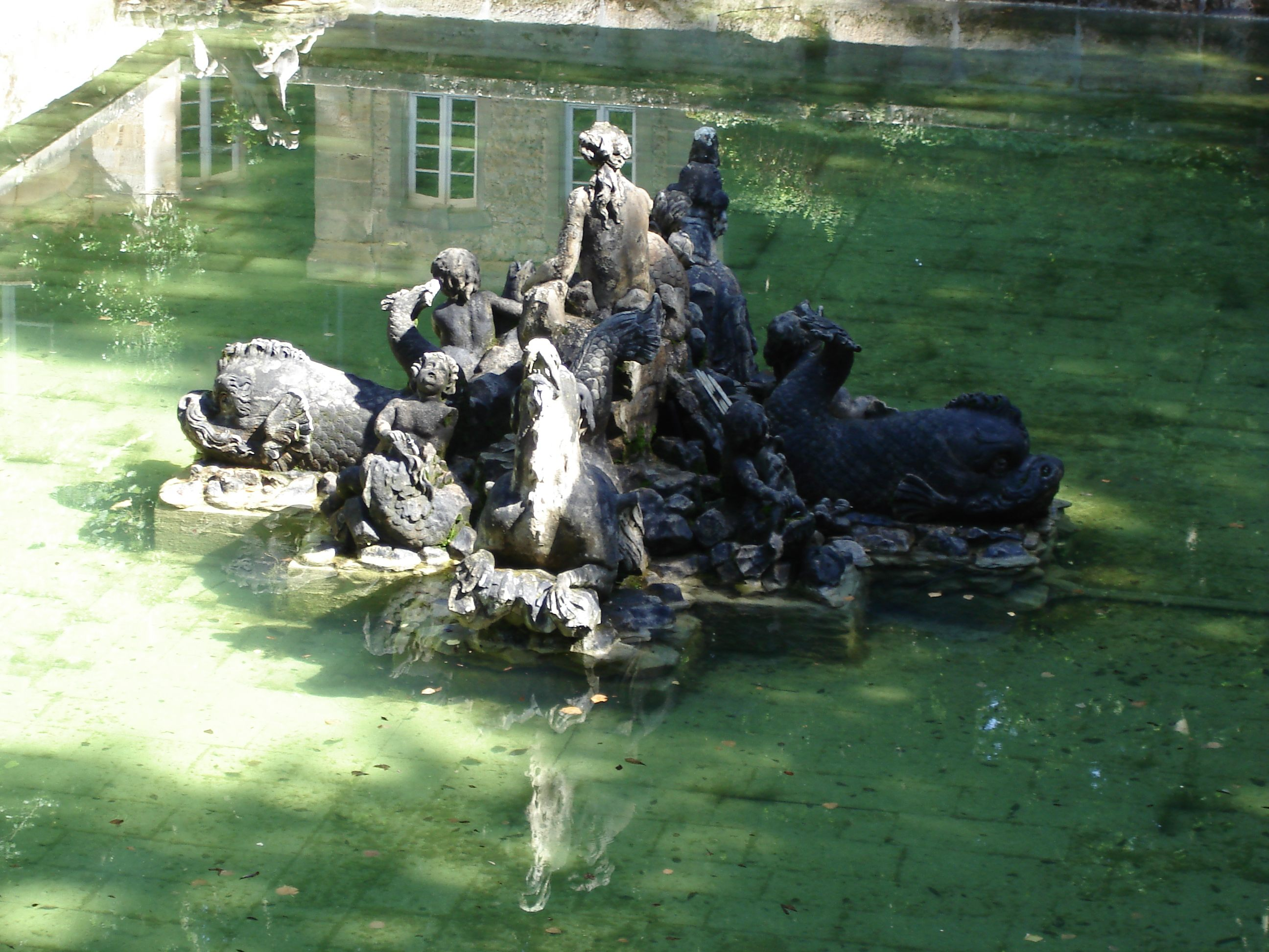 Eremitage (Bayreuth), Brunnen in der unteren Grotte